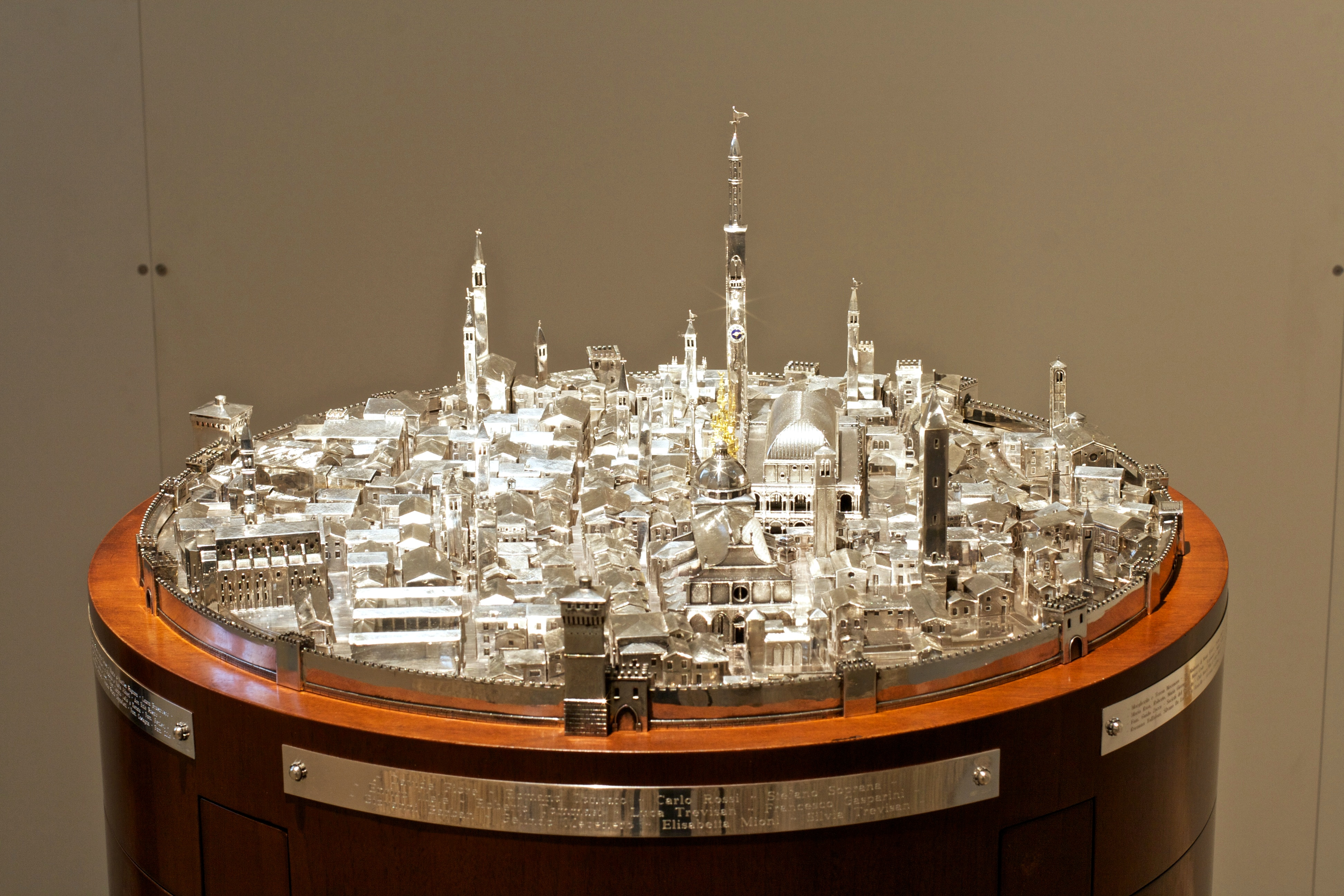 Il Gioiello di Vicenza sul piedistallo di esposizione al Museo Diocesano di Vicenza.